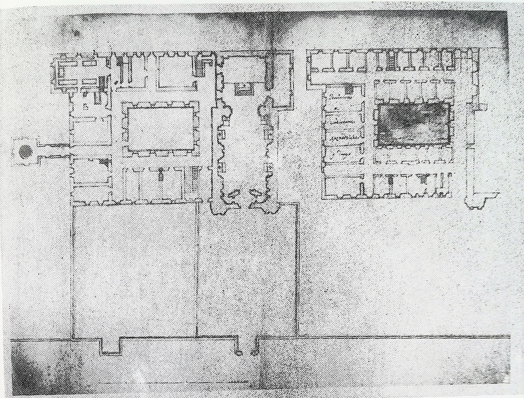 Plan klasztoru reformatów. Pilica. Przyziemie i piętro. Ok. 1743 r.